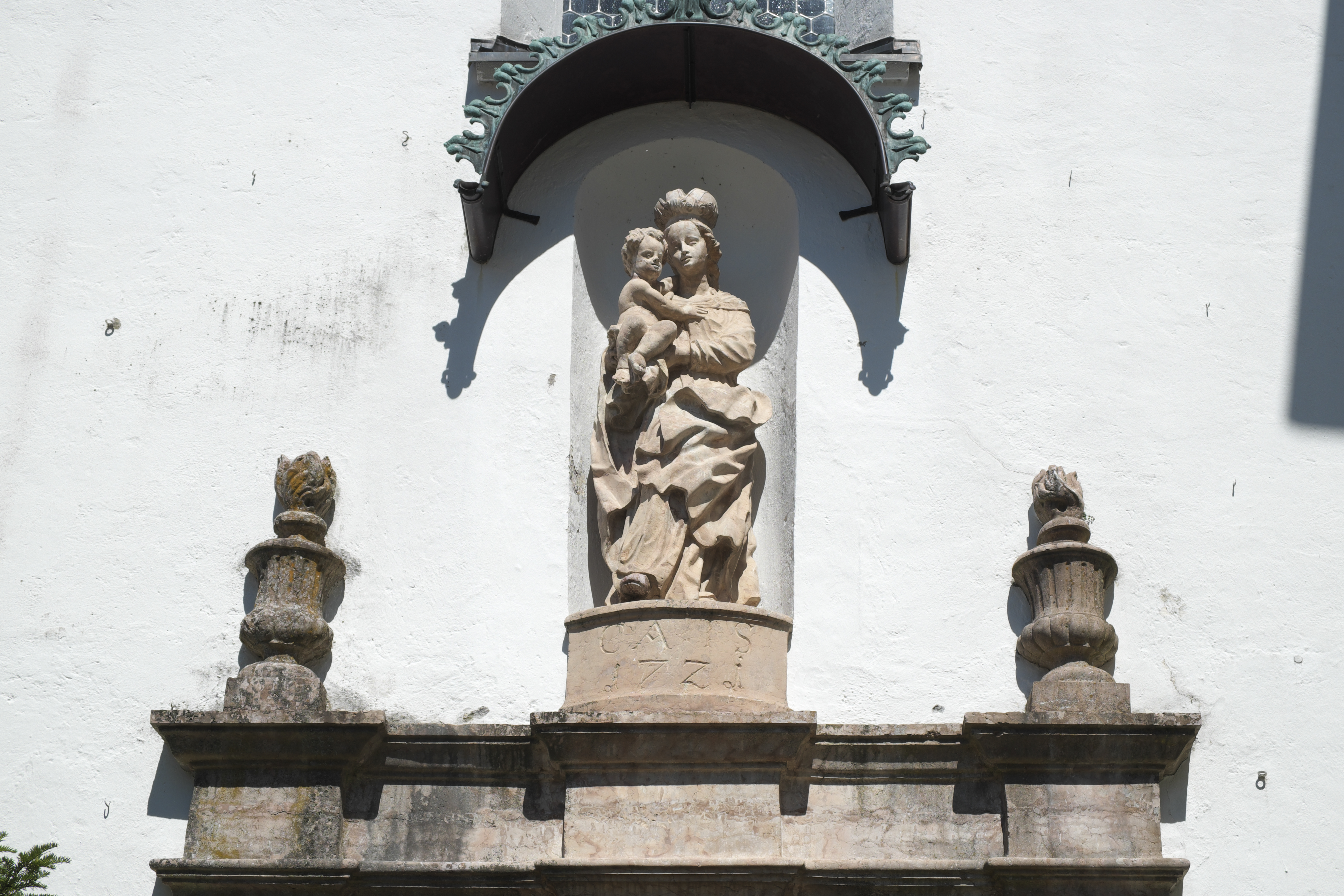 Katholische Pfarrkirche, ehemalige Benediktinerklosterkirche St. Lambert in Klosterseeon, einem Ortsteil von Seeon-Seebruck im Landkreis Traunstein (Bayern/Deutschland), Madonna mit Kind über dem Eingang, mit der Jahreszahl 1721